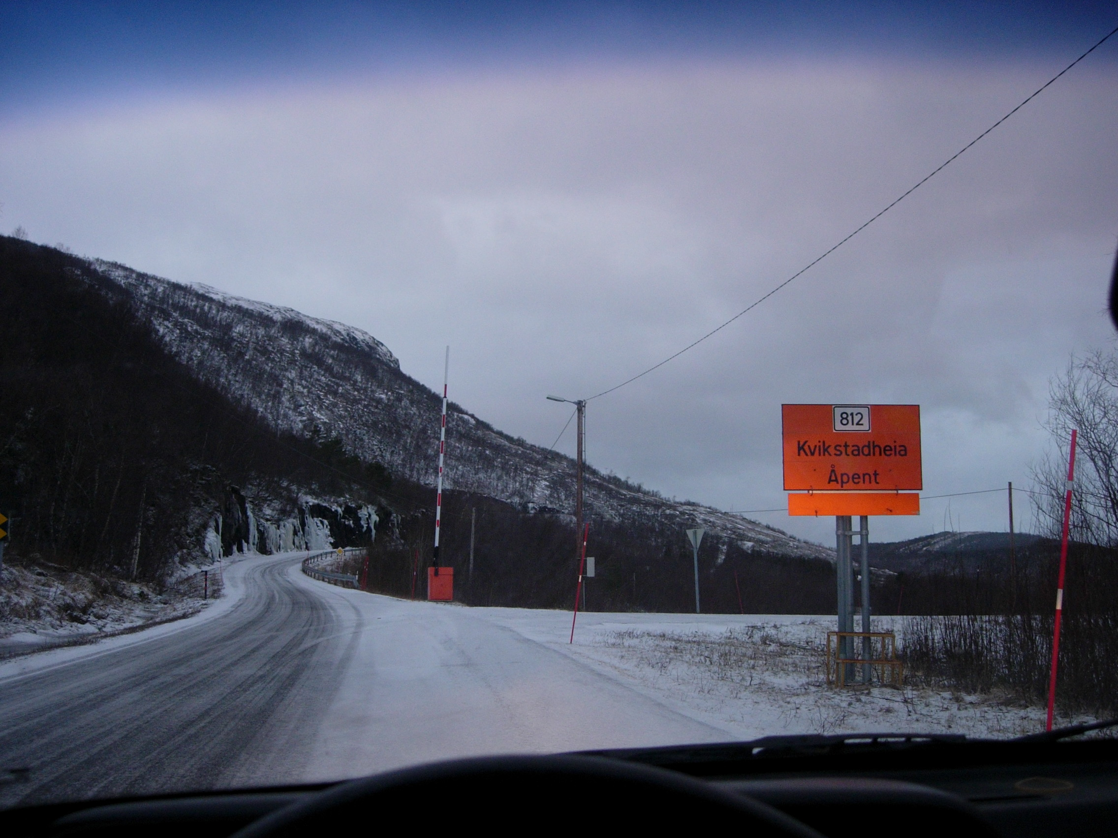 Kvikstadheia on RV 812 in Bodø, Norway]